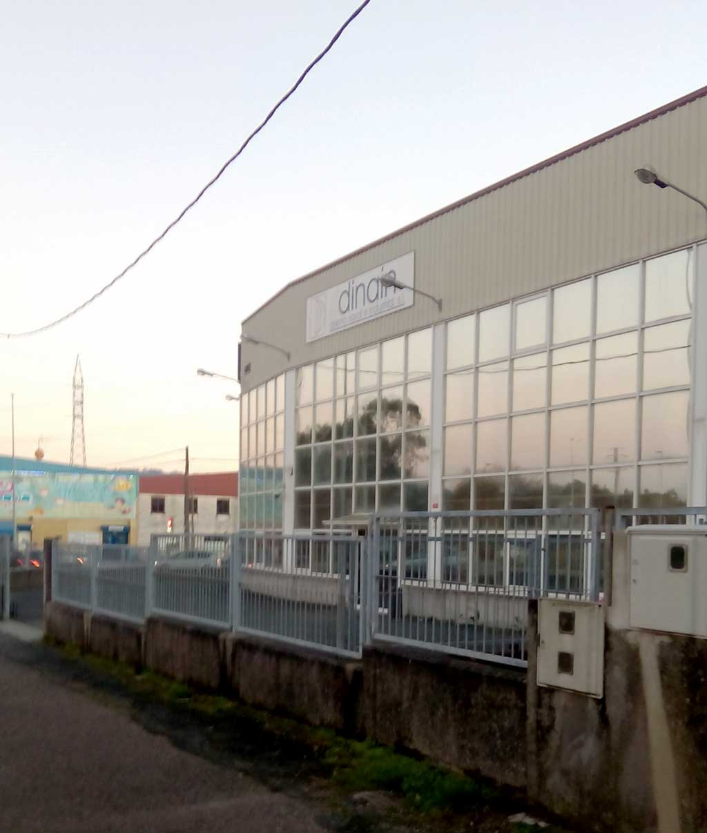 Oficinas de Dinain en Narón.